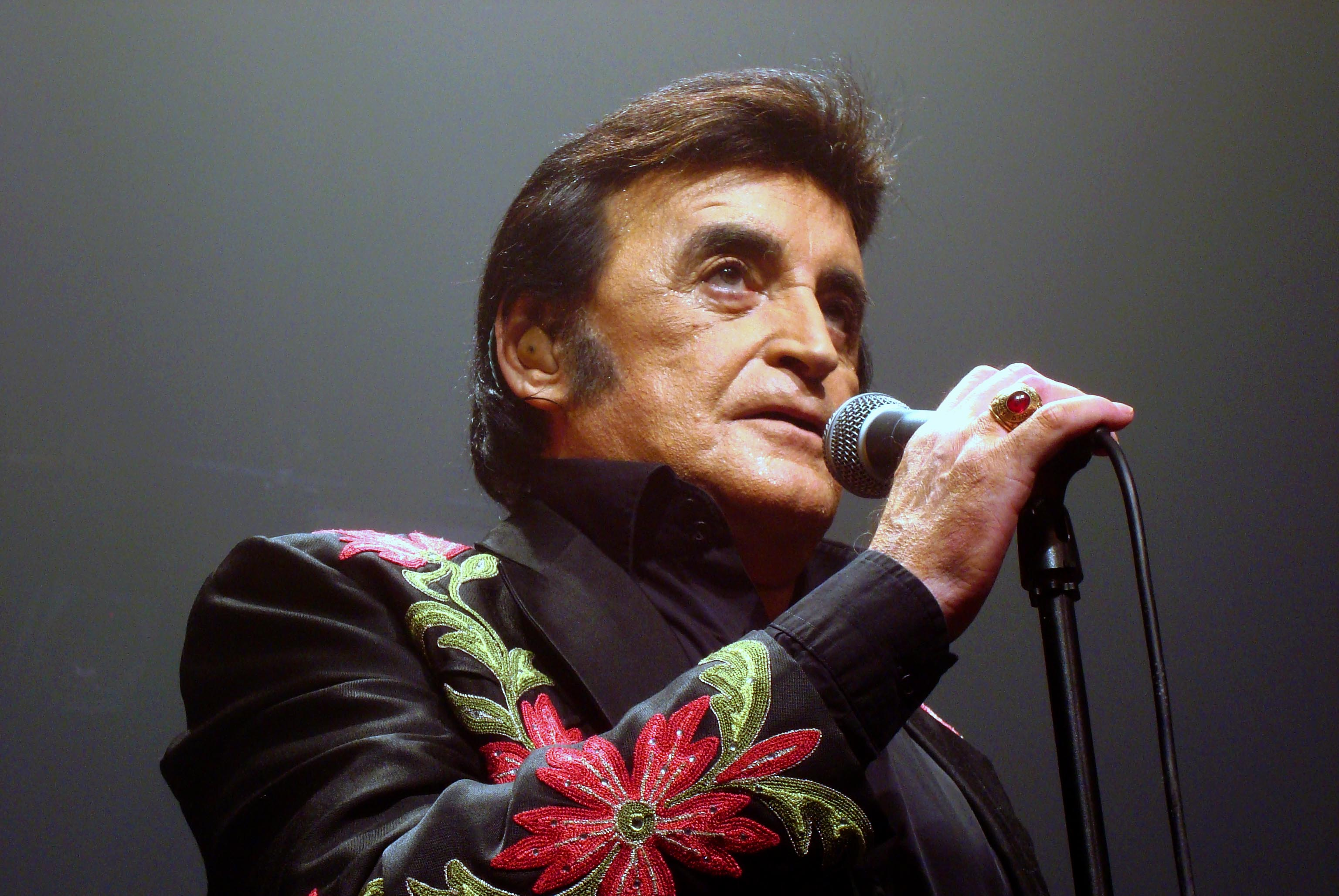 sur scène en 2012. crédit photo Bemelmans Michaël.